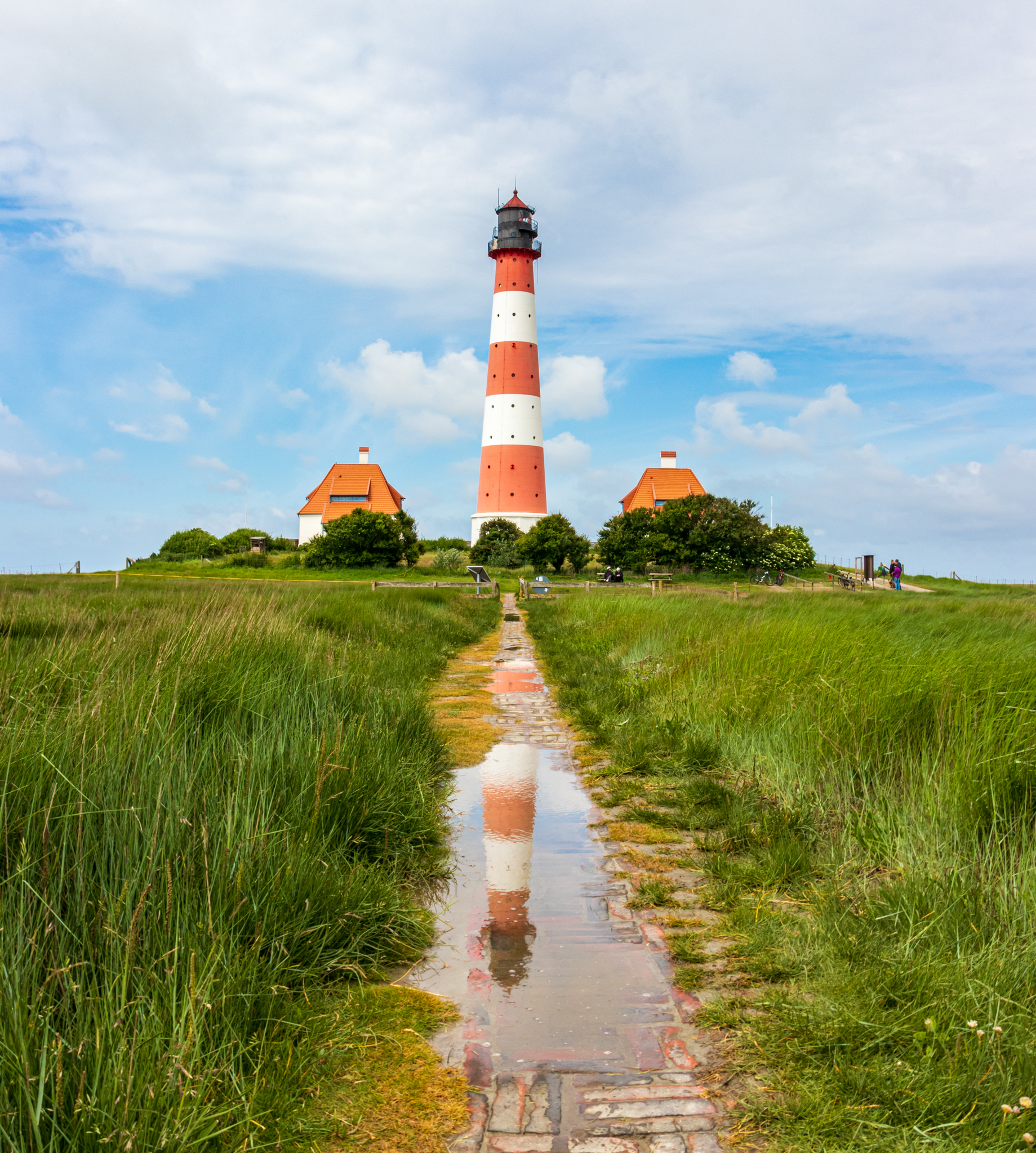 Der Leuchtturm Westerheversand vom Stockenstieg aus gesehen.